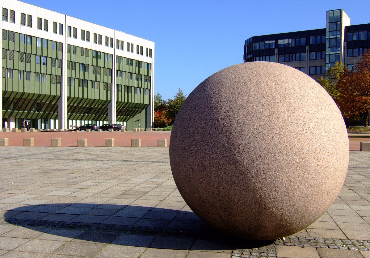 Leo Kornbrust: o.T. (1987), Bonn, Bundesministerium für Verkehr und digitale Infrastruktur (zum Zeitpunkt der Aufnahme: Bundesministerium für Verkehr, Bau und Stadtentwicklung), Robert-Schuman-Platz